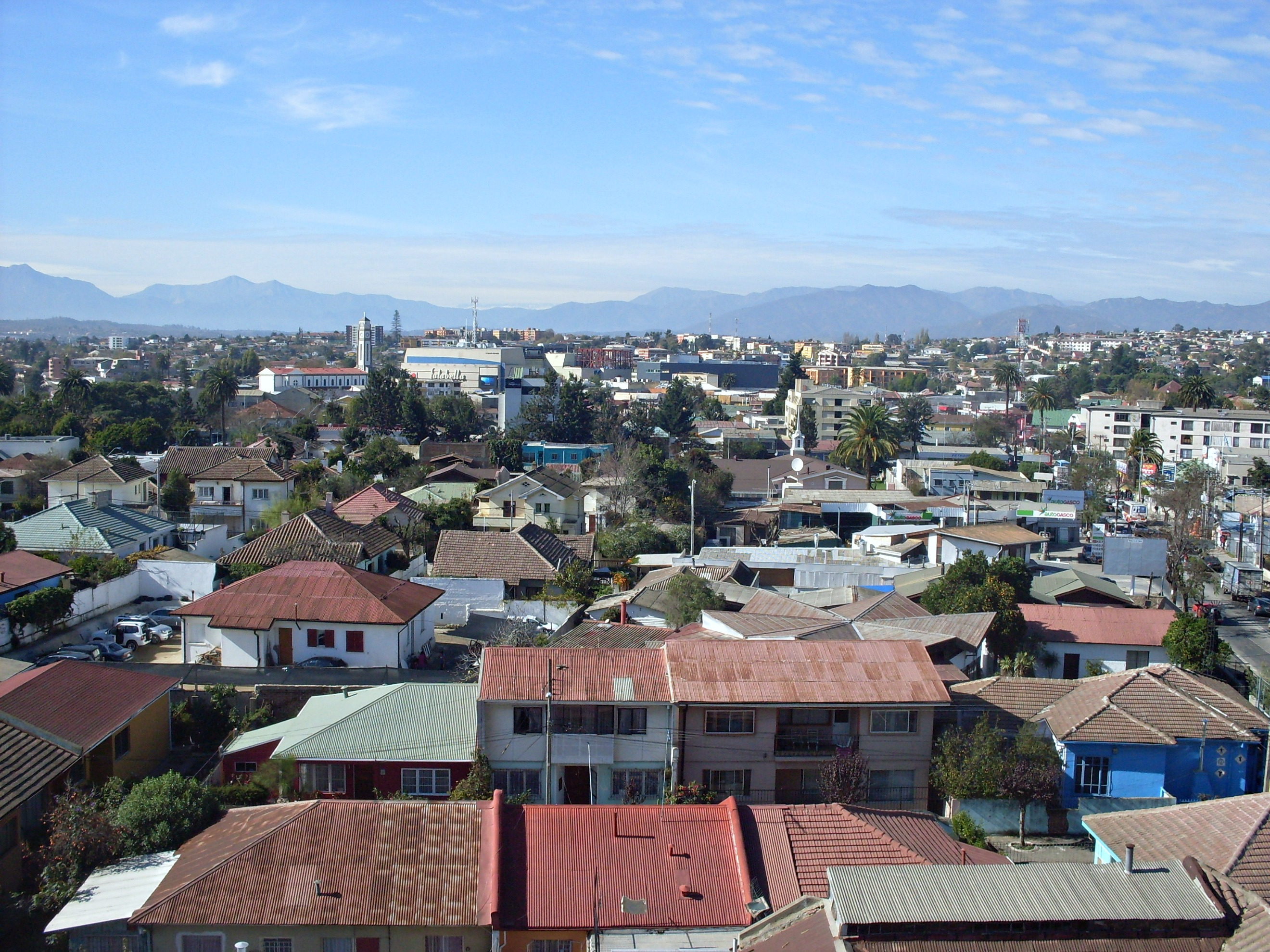 Centro de la ciudad de Quilpué, mirado desde el Condominio Sol Poniente en dirección al este.